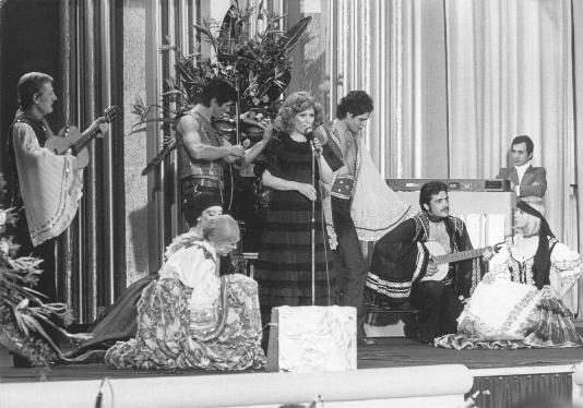 Orietta Berti al Festival di Sanremo 1976